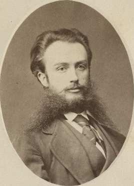 Eestimaa maanõunik ja rüütelkonna peamees Georg von Engelhardt (1843-1914)